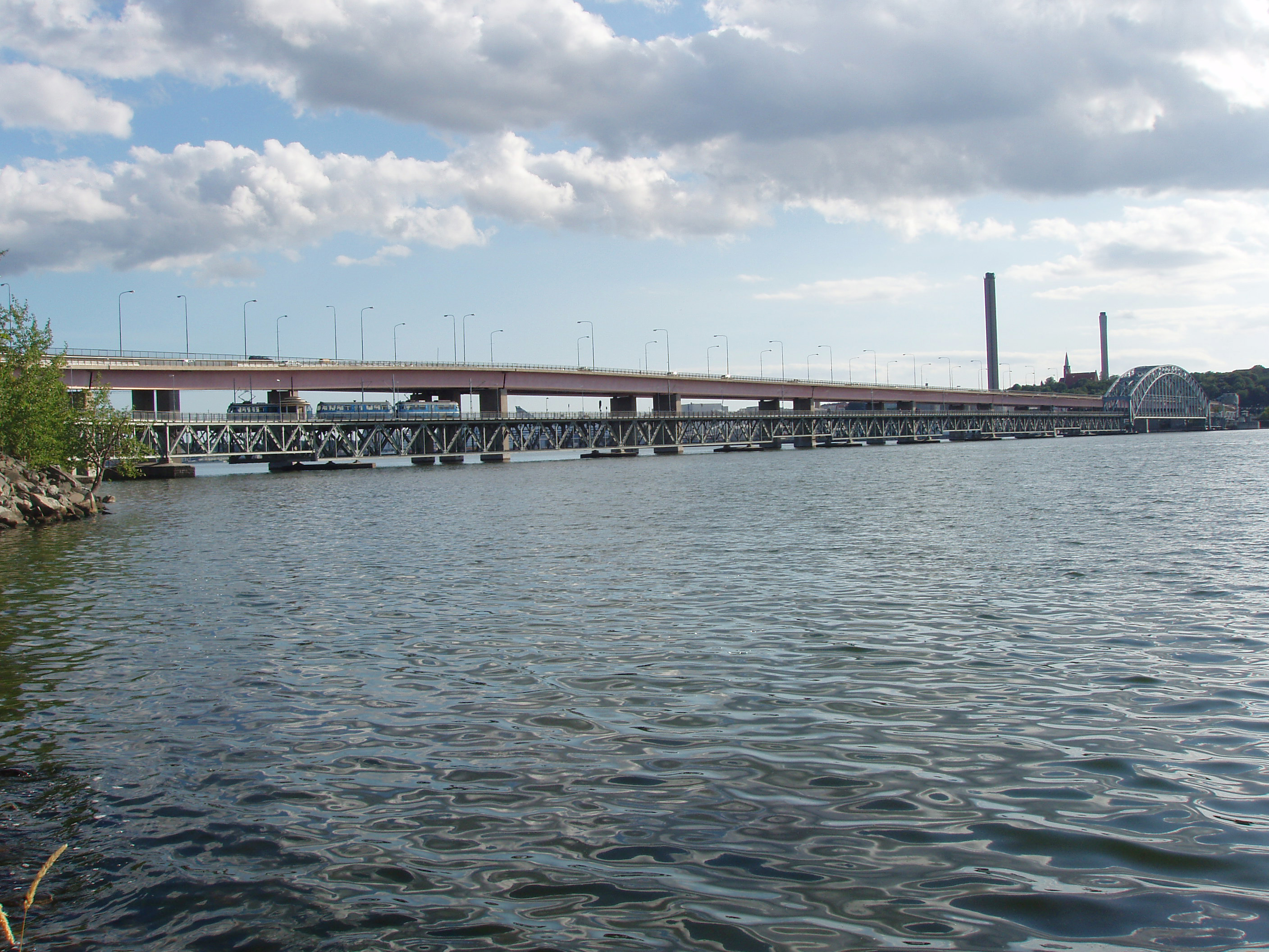 Lidingöbroarna med gamla Lidingöbron närmast. Vy från Islingeområdet på Lidingö mot Ropsten på Stockholmssidan. Ett tåg tillhörigt Lidingöbanan linje 21 med ett vagnsset med tre vagnar färdas på gamla Lidingöbron i närheten av brogrenen.